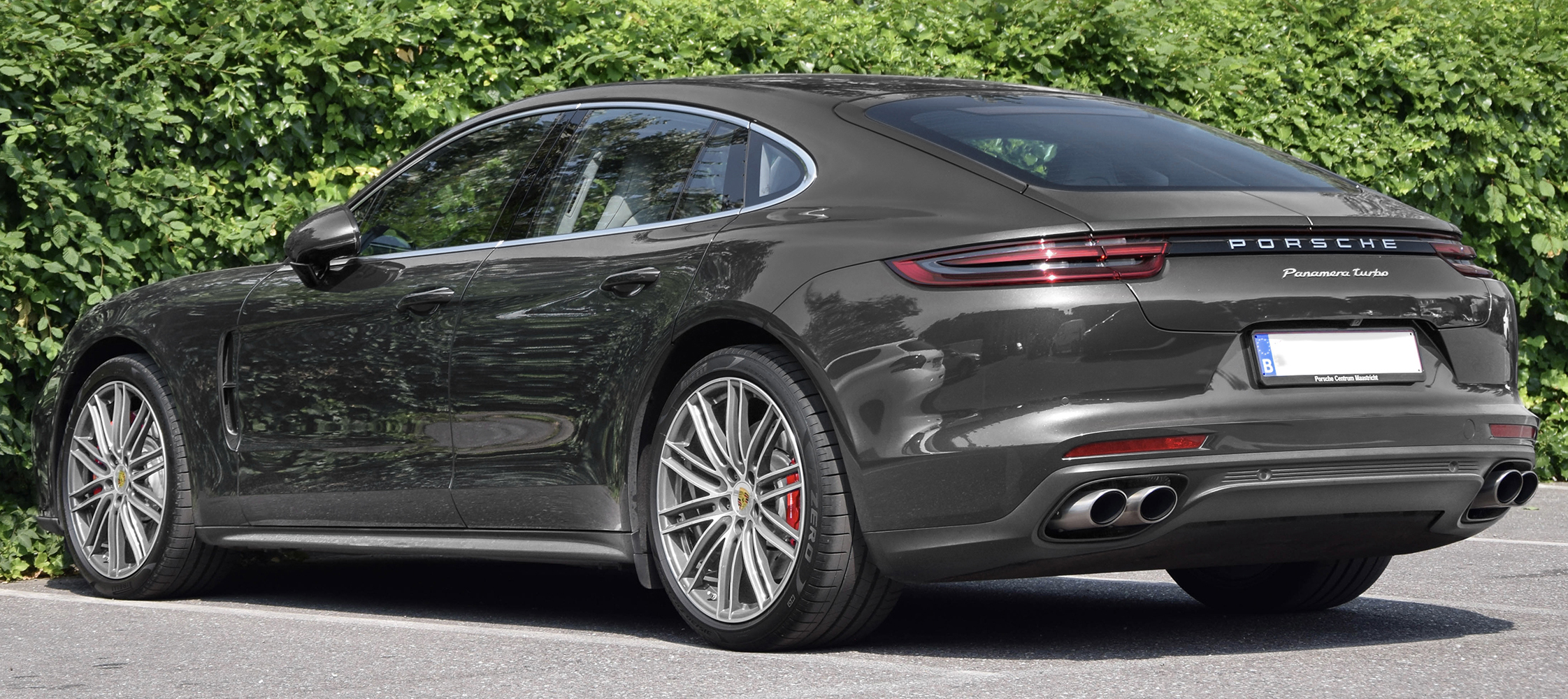 Couleur : Gris Quartz métallisé